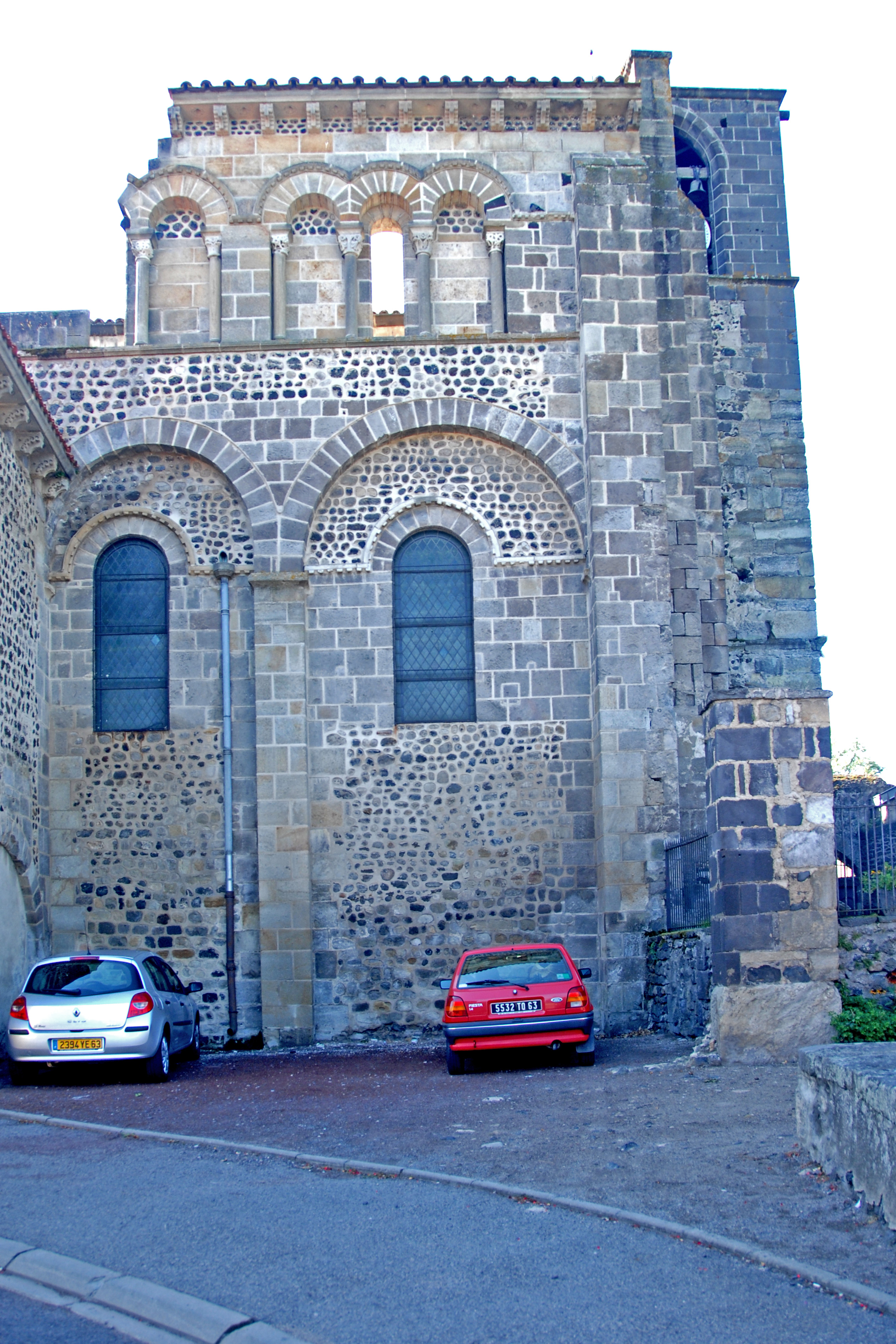 Mozat, Langhausjoch 1 + 2, Reste des Emporengeschosse